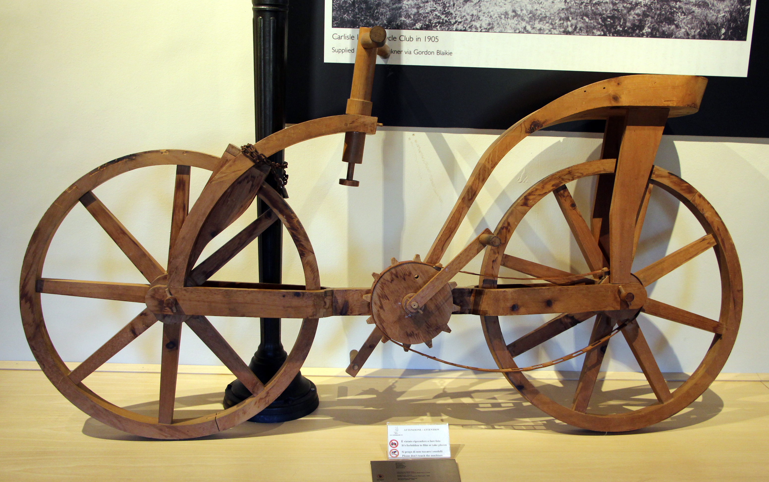 Museo Leonardiano (Vinci)